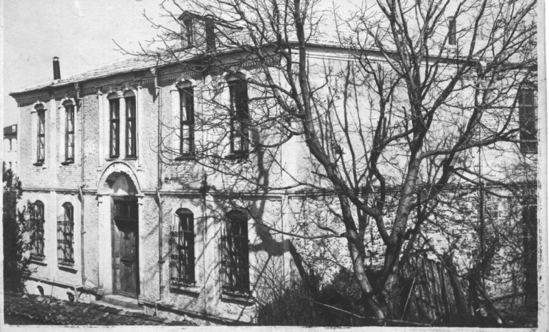 Новата сграда на училището към църквата „Света Троица“ в Малко Търново.